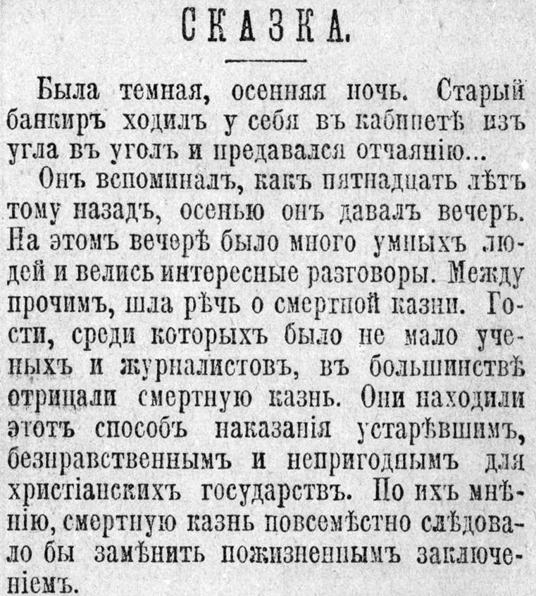 Начало рассказа "Сказка" ("Пари")